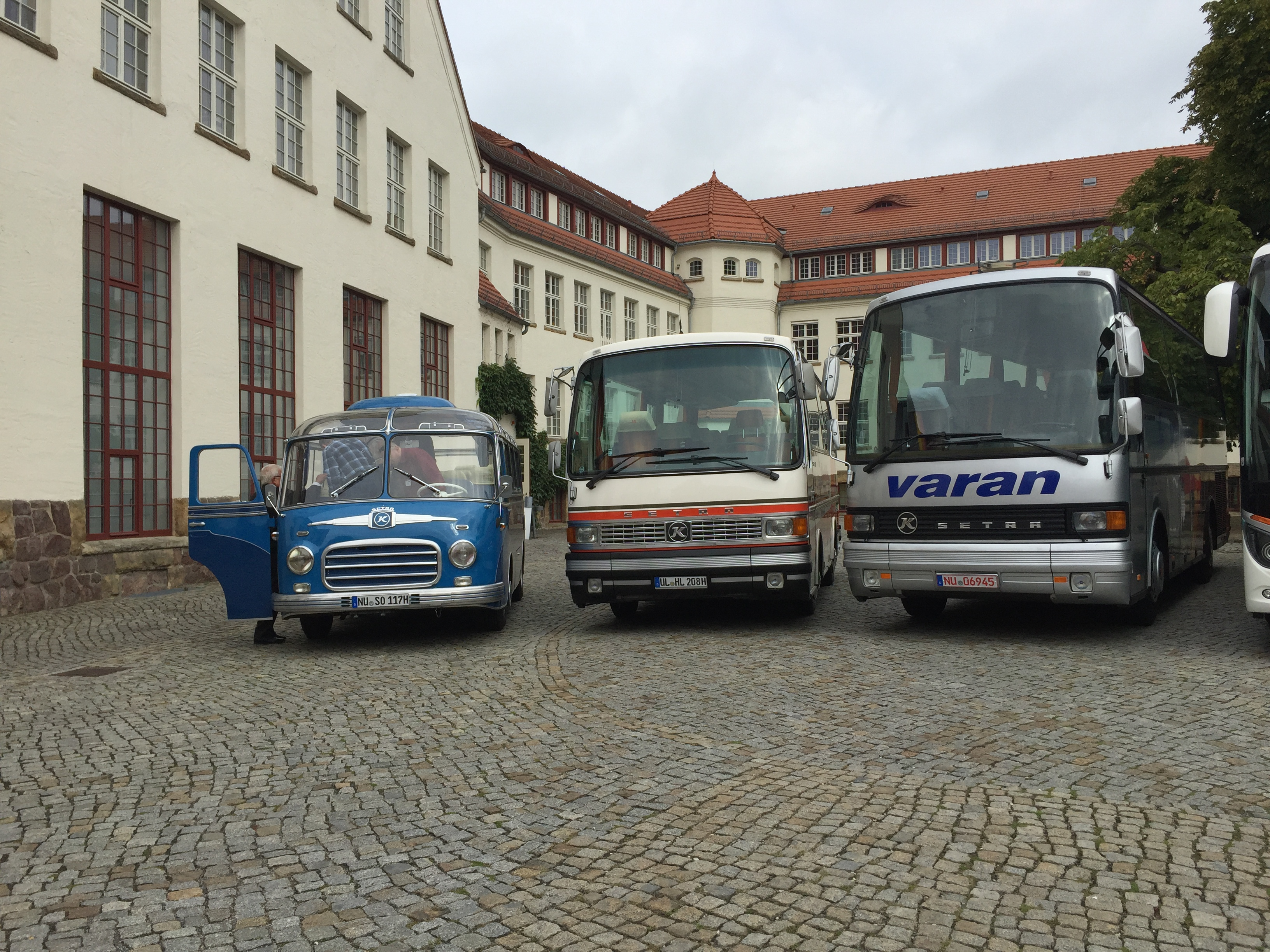 setra Bus generations